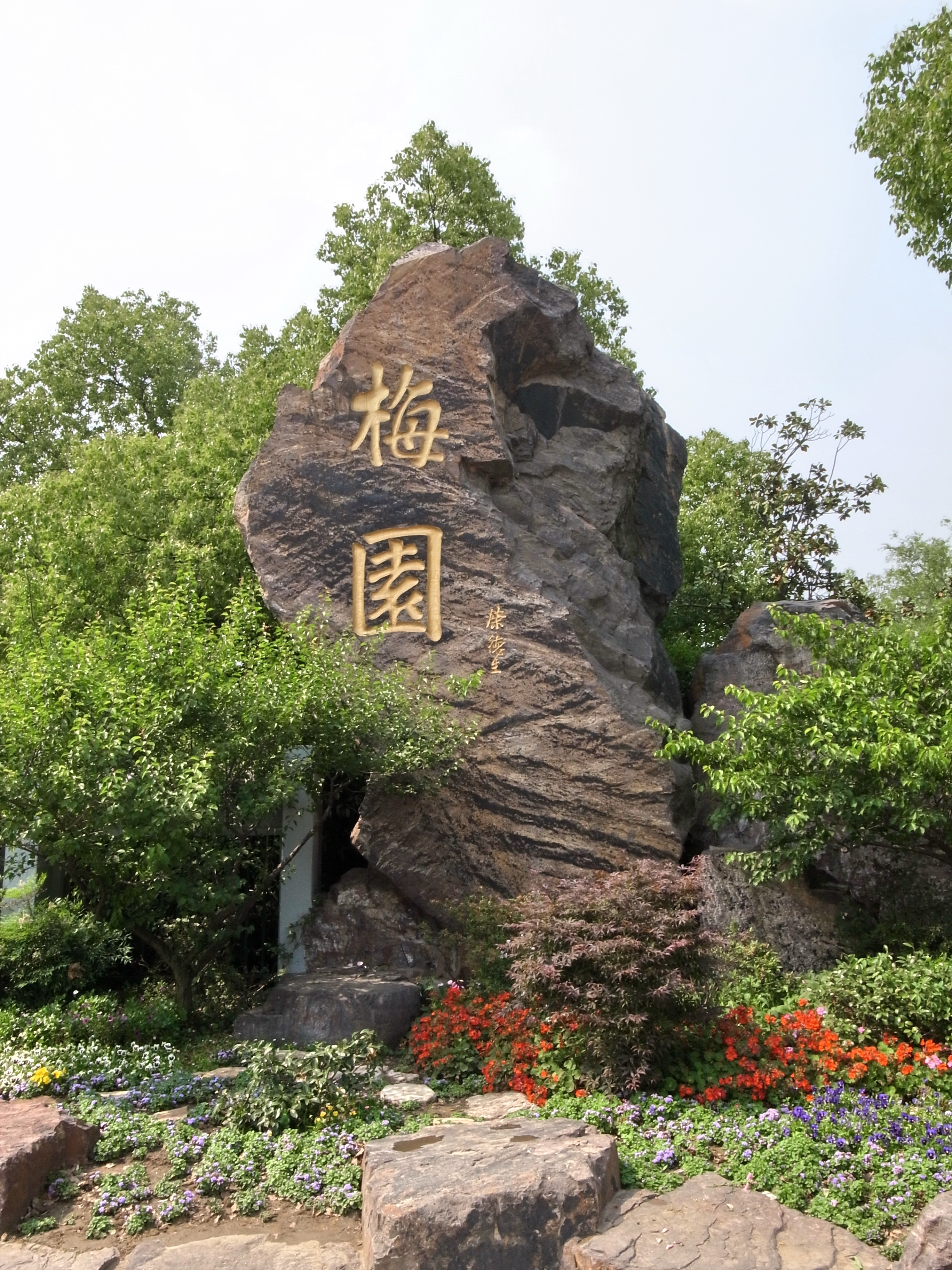 无锡梅园